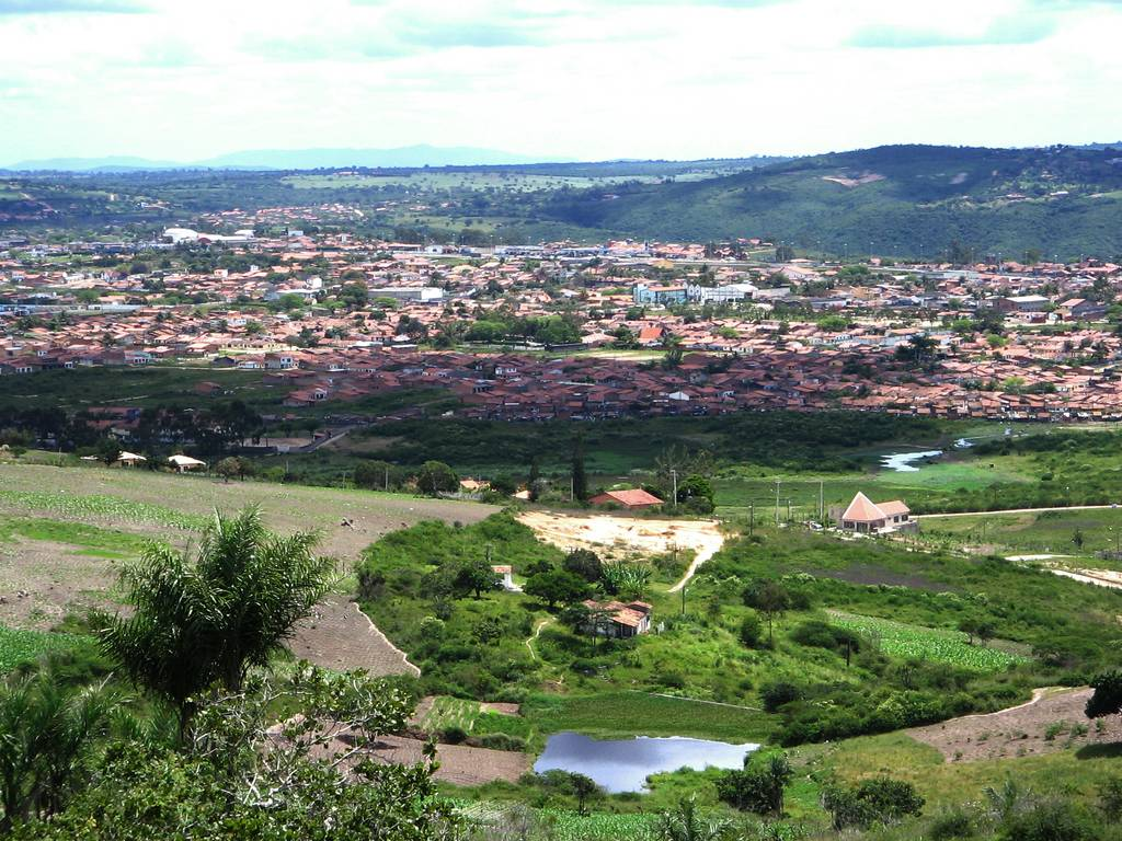 Parte da cidade de Gravatá-PE, Brasil.